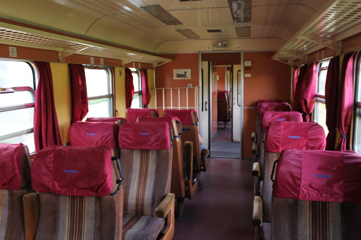 Przedział 1. klasy w elektrycznym zespole trakcyjnym ED72-009. This photo was taken during Railway Wikiexpedition 2014 set up by Wikimedia Polska Association in cooperation with Fundacja Grupy PKP. You can see all photographs in category Wikiekspedycja kolejowa 2014.